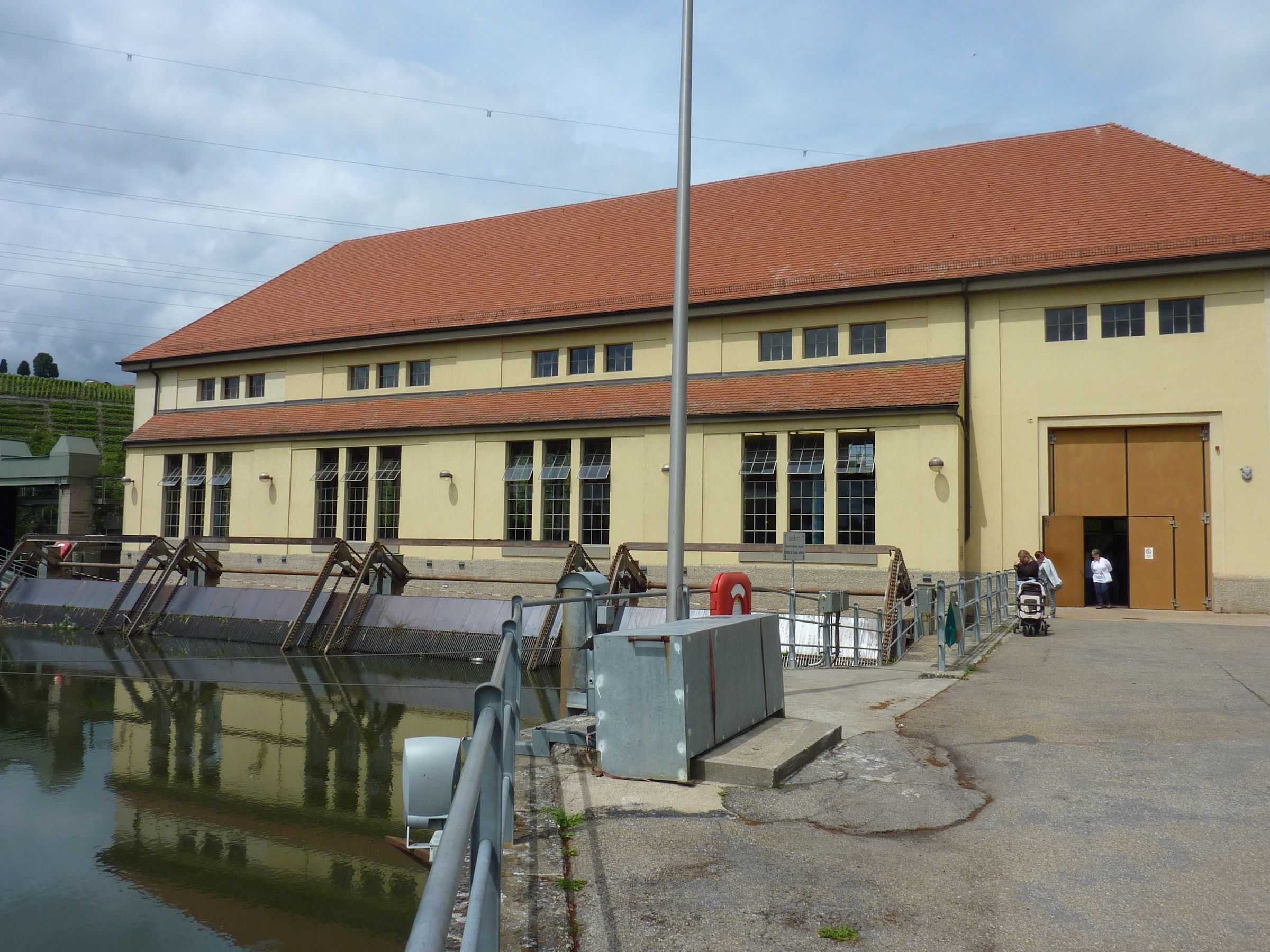 Wasserkraftwerk Pleidelsheim